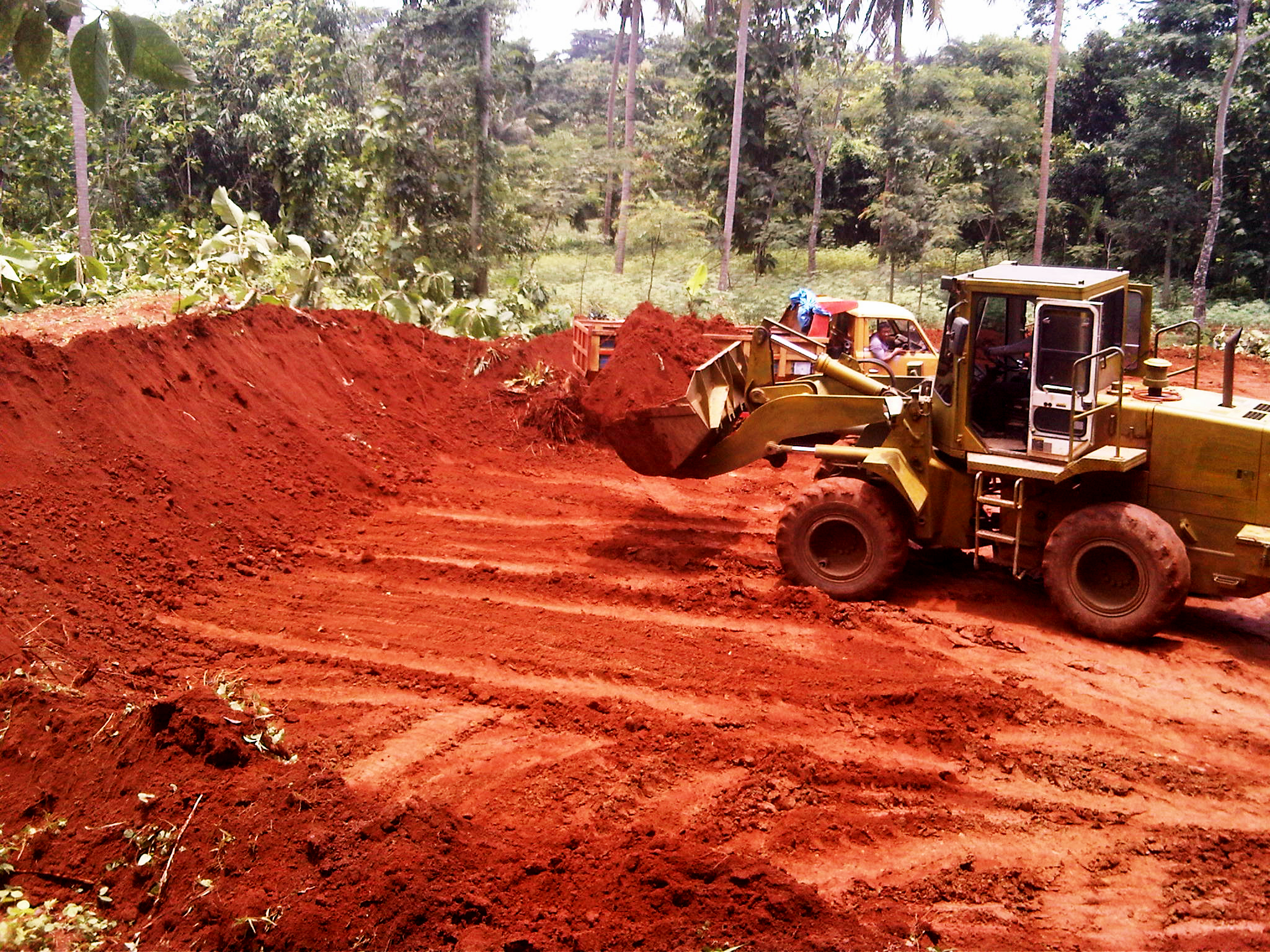 Tanah merah merupakan tanah yang berwarna merah hingga coklat yang terbentuk pada ligkungan yang lembab, dingin, dan mugkin genangan-genangan air, Secara spesifik tanah merah memiliki profil tanah yang dalam,mudah menyerap air memiliki kandungan bahan organik yang sedang, dan pH netral hingga asam sehingga baik digunakan untuk pertanian maupun pondasi rumah karena mudah menyerap air tekstur tanah merah relative padat dan kokoh untuk menopang bangunan diatasnya